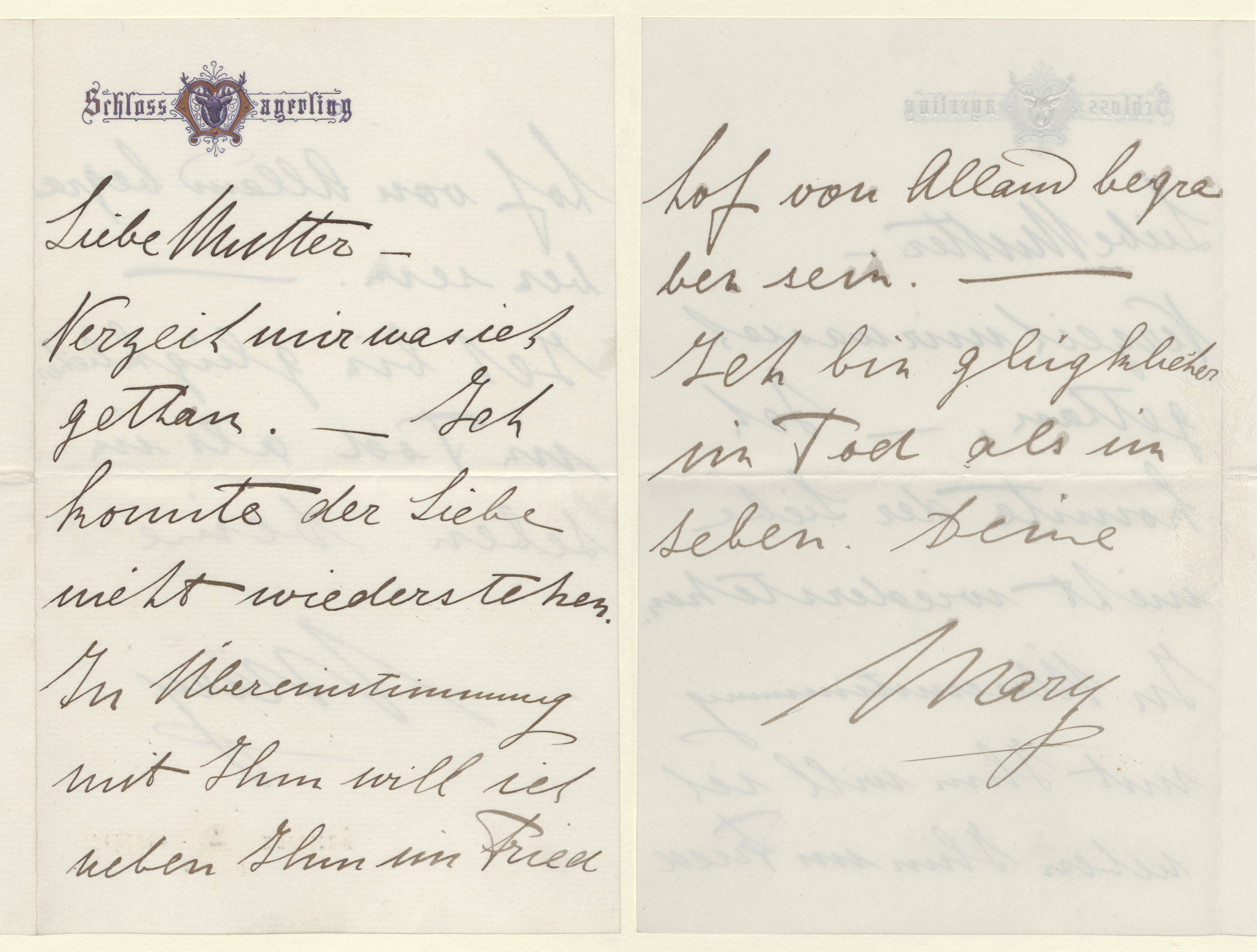 Abschiedsbrief von Mary Vetsera an ihre Mutter Liebe Mutter – Verzeih mir was ich gethan. – Ich konnte der Liebe nicht wiederstehen. In Übereinstimmung mit Ihm will ich neben Ihm im Friedhof von Alland begraben sein. – Ich bin glücklicher im Tod als im Leben. Deine Mary